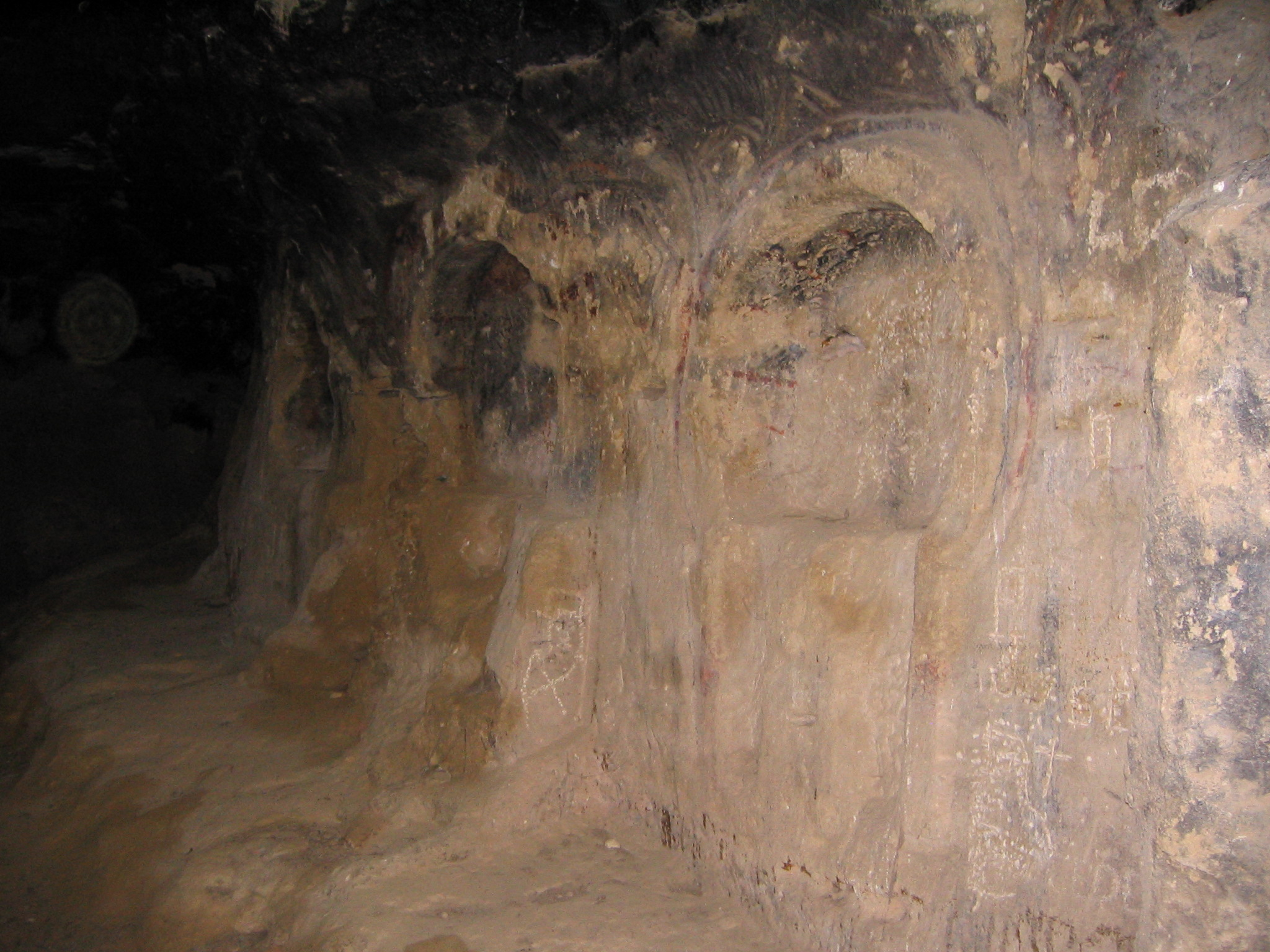 Cueva de los siete altares en el Parque Natural de las Hoces del Río Duratón (Sepúlveda, Segovia España).